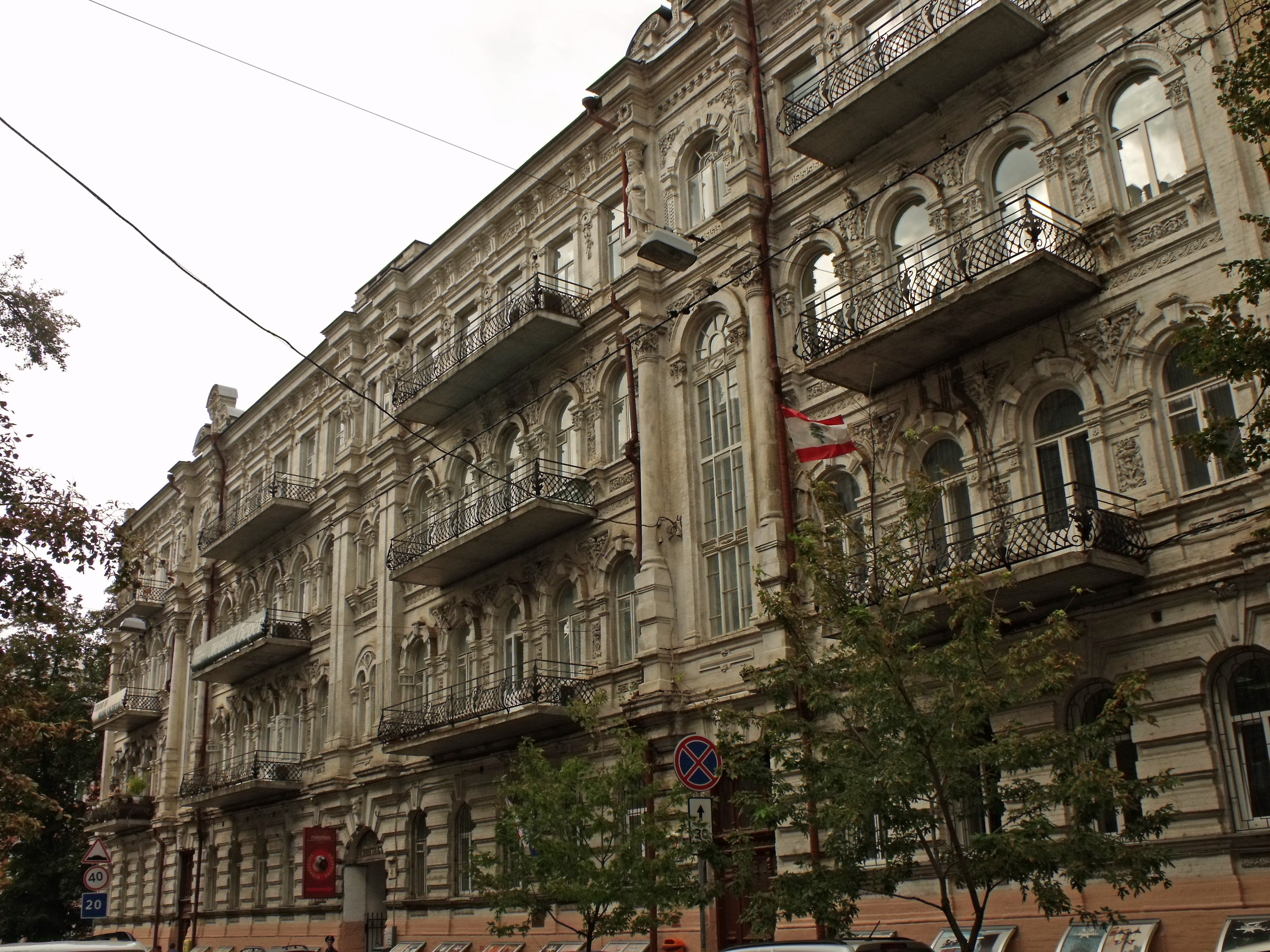 Будинок прибутковий, Київ, Чапаєва вул., 4